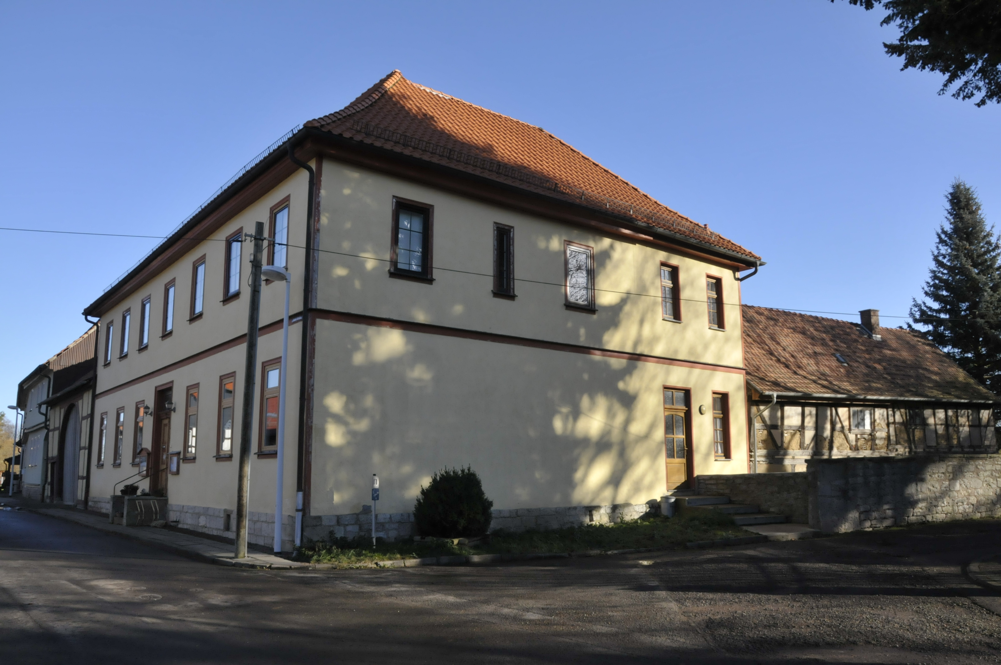 Sonneborn, Pfarrhaus